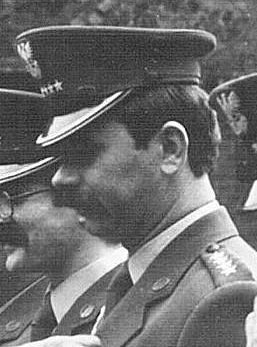 kpt. Marek Banach – batalion graniczny WOP Prudnik.